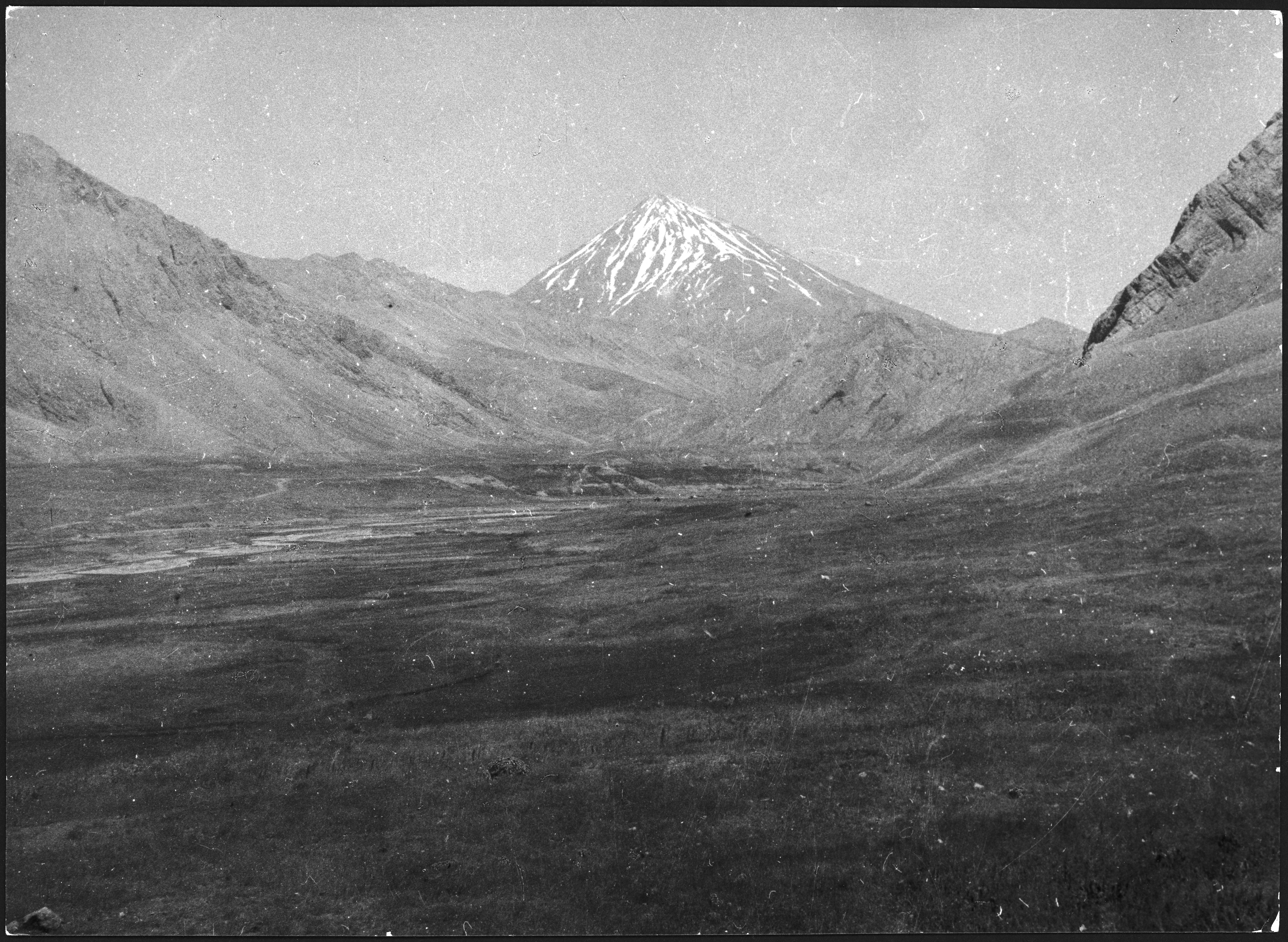 Persien, Elburs-Gebirge (Elburz): Landschaft; Schneebedeckter Demawand (Dawawand)